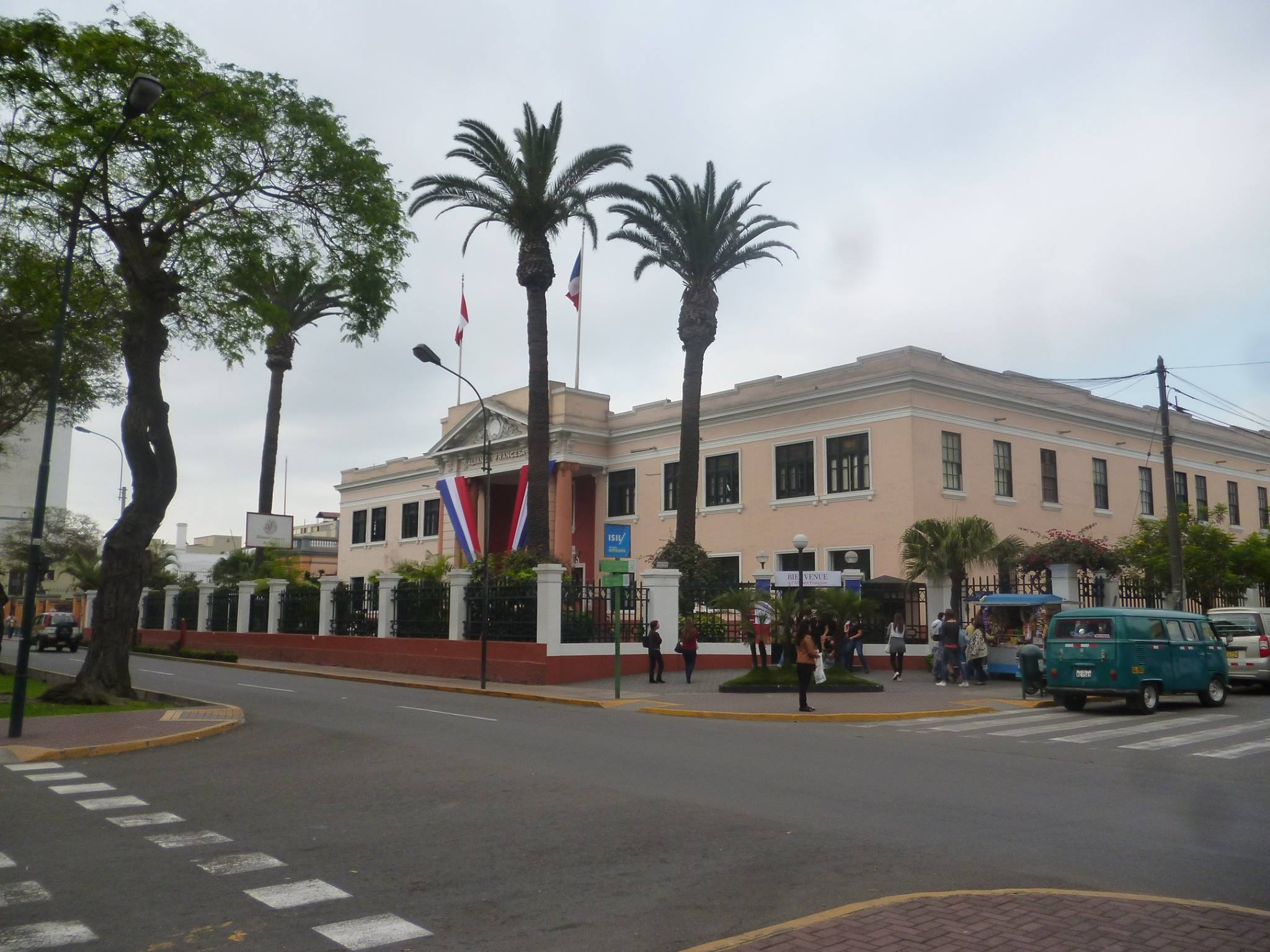 Alianza Francesa de Lima - Sede Miraflores